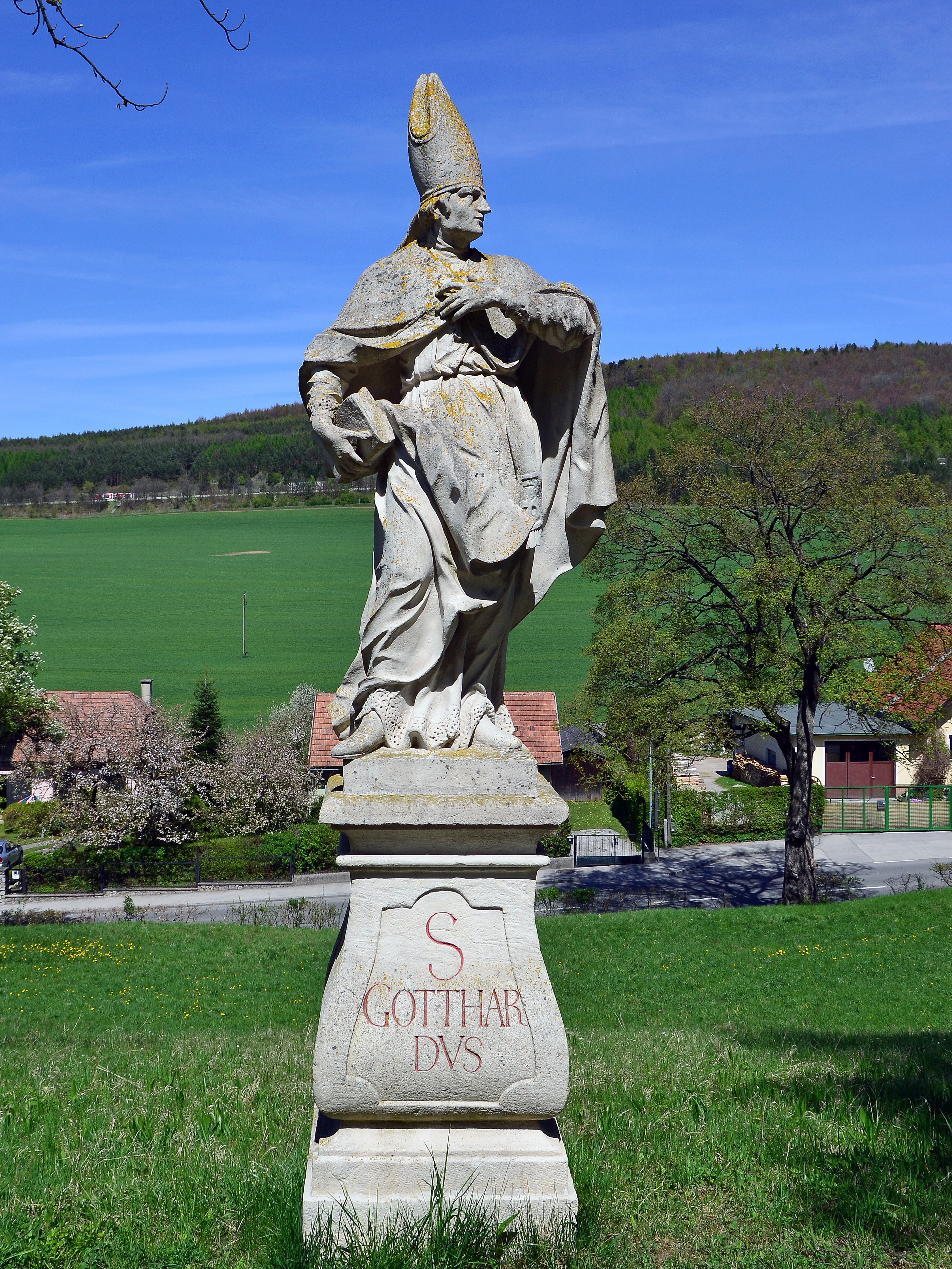 Hl. Gotthardus am Kreuzweg Heiligenkreuz